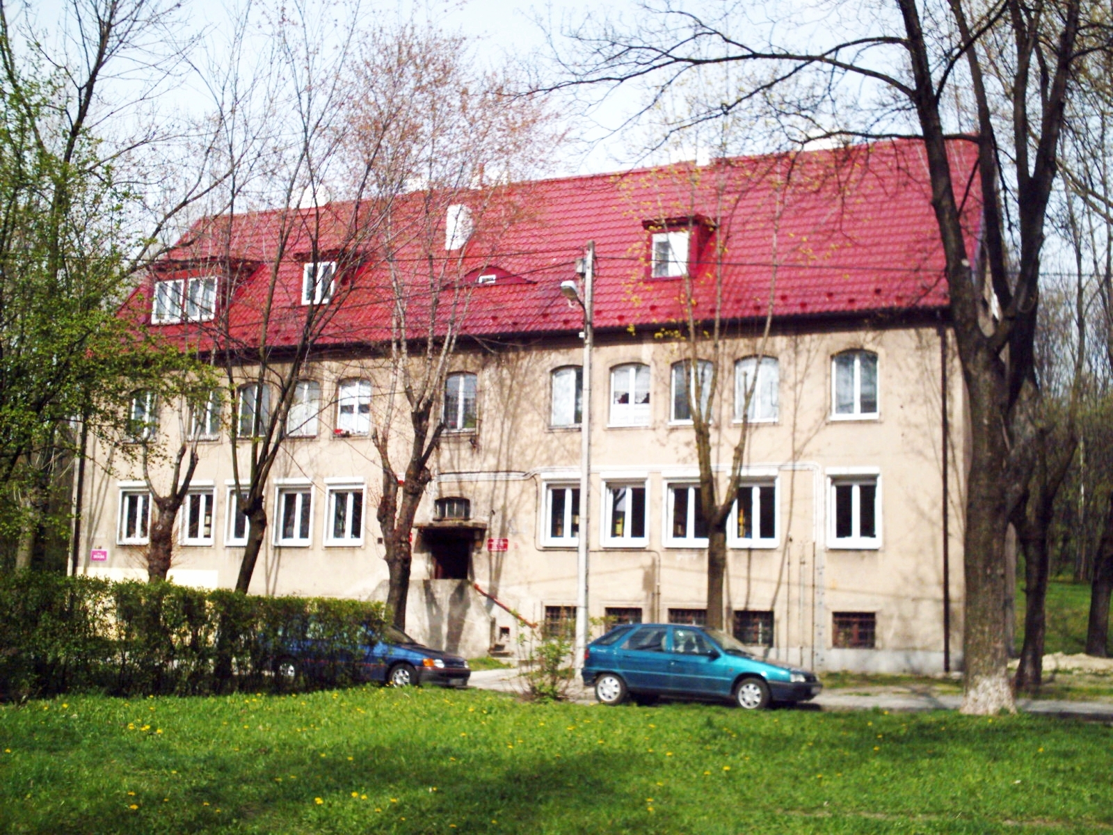 Biblioteka publiczna przy ul. Skalnej.